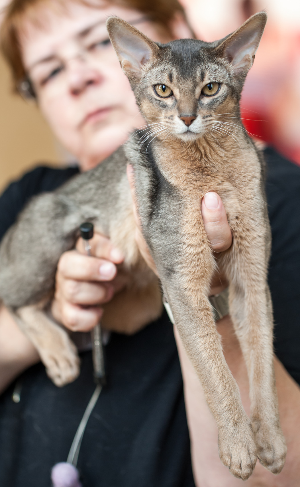 Link Nyota Ziko Humu, jeune abyssin bleu présenté à l'exposition féline d'Helsinki. Code FIFé : Link Nyota Ziko Humu (Heikki) [ABY a] young male EX1 NOM